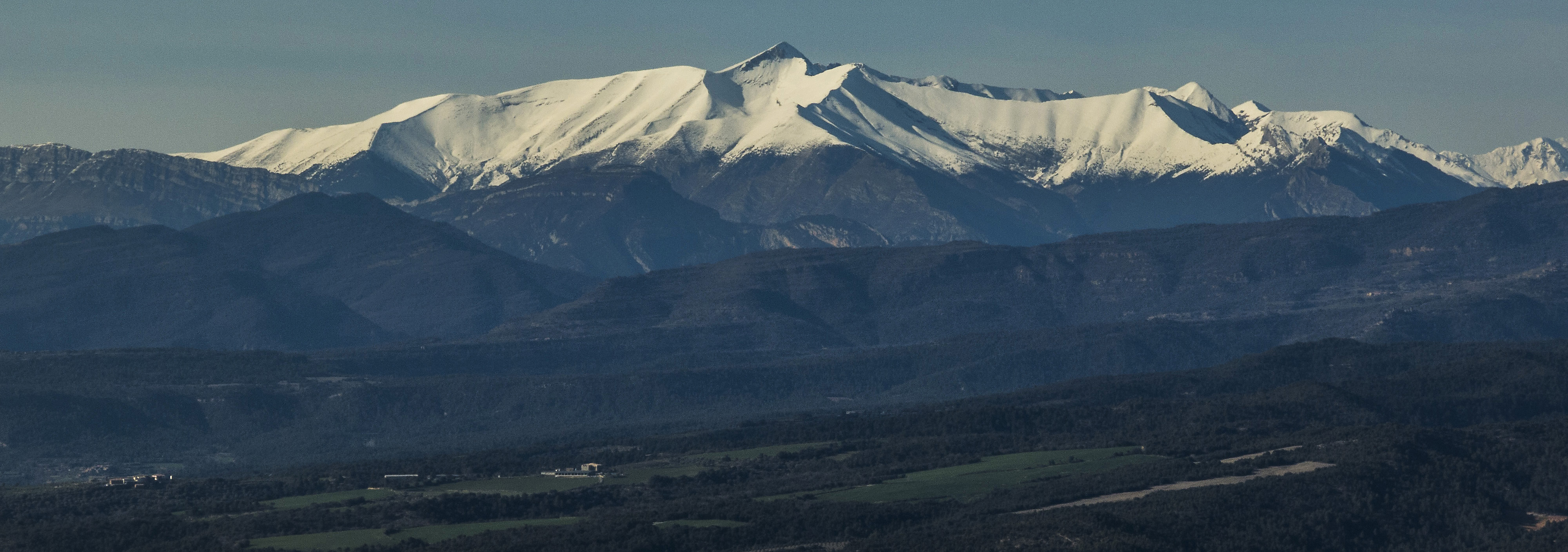 Imatge del Cotiella (Osca-Prepirineu d'Aragó), feta des de la serra del castell de Llaguarres, que està situada a la Baixa Ribagorça.